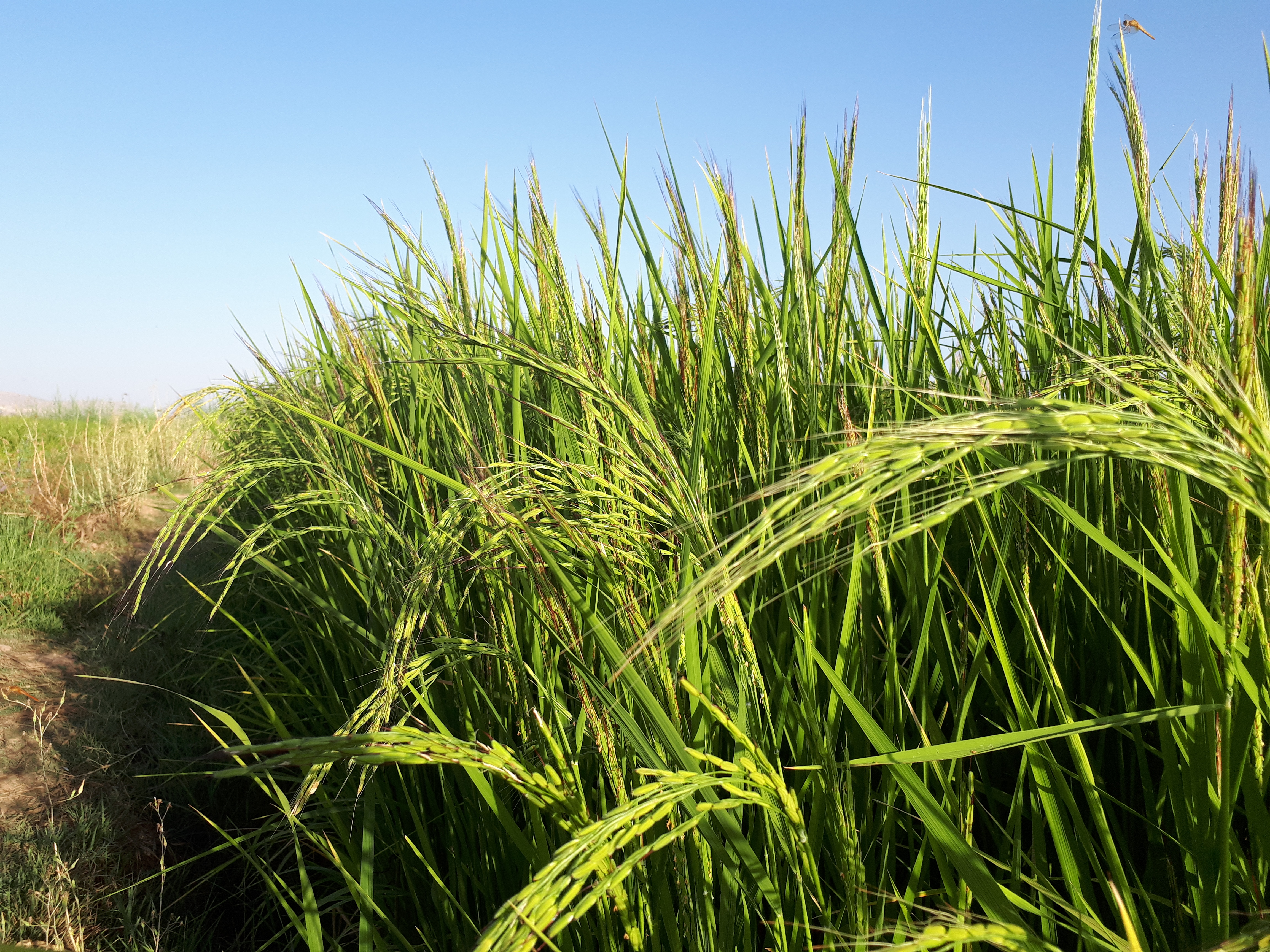 کشت برنج مرغوب روستای چم دیوان - تابستان ۱۳۹۷